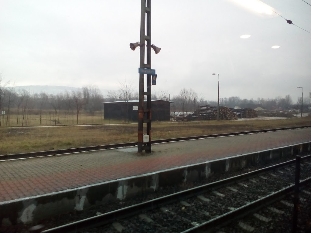 Tóvároskert megállóhely